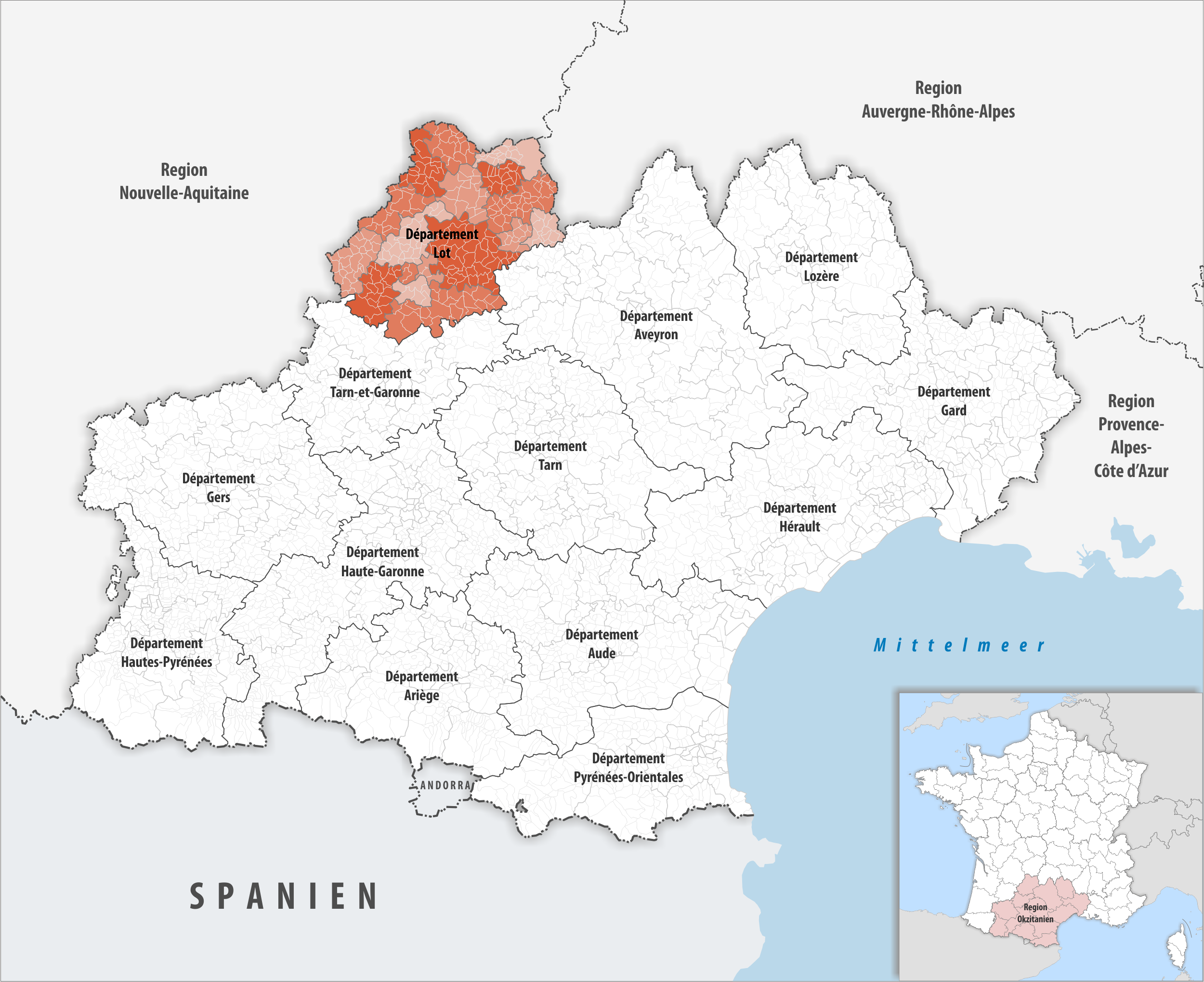 Lage des Departements Lot